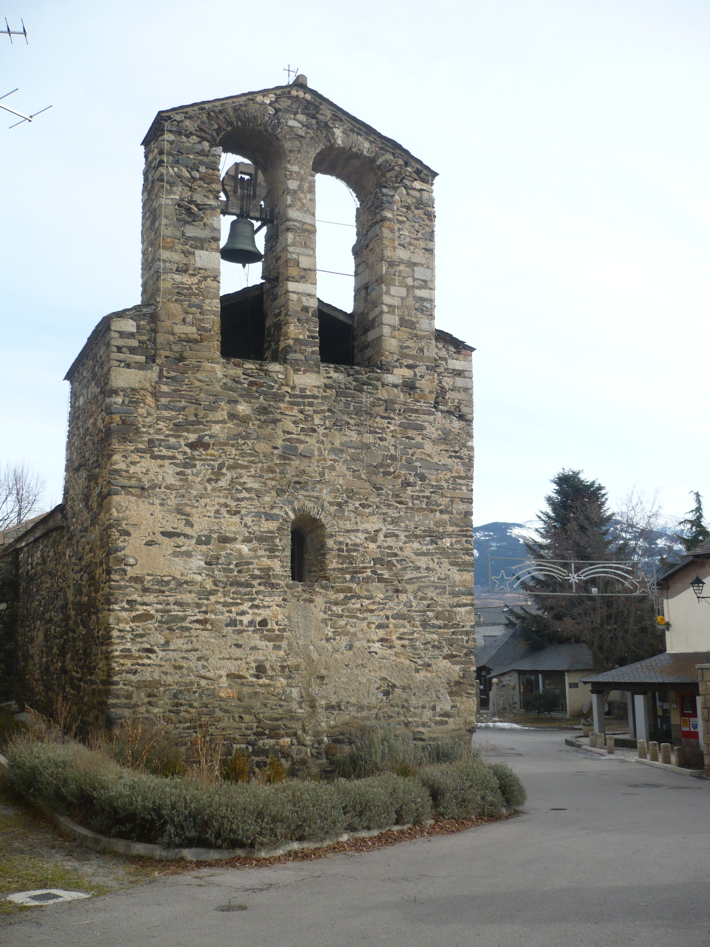 Clocher de l'église Saint-Julien d'Estavar